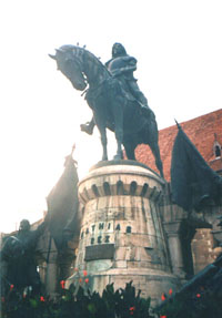 A Mátyás-szobor Kolozsváron